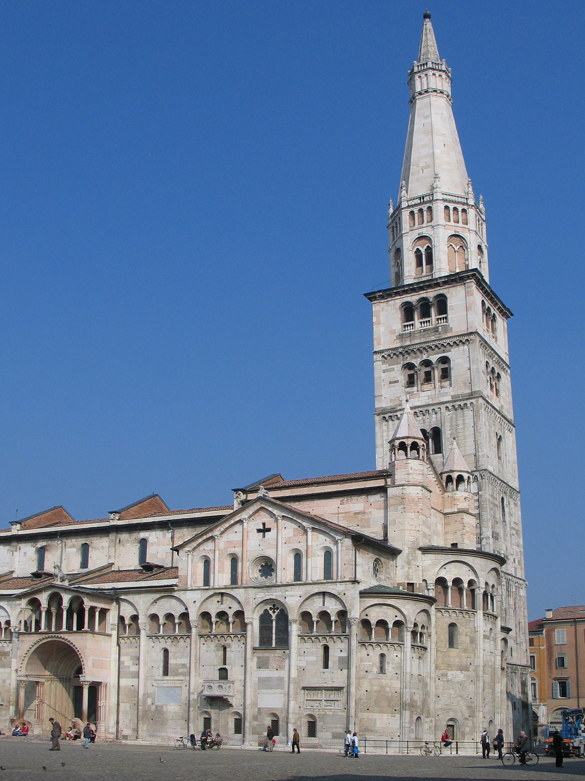 Duomo di Modena e torre Ghirlandina, piazza Grande This is a photo of a monument which is part of cultural heritage of Italy.